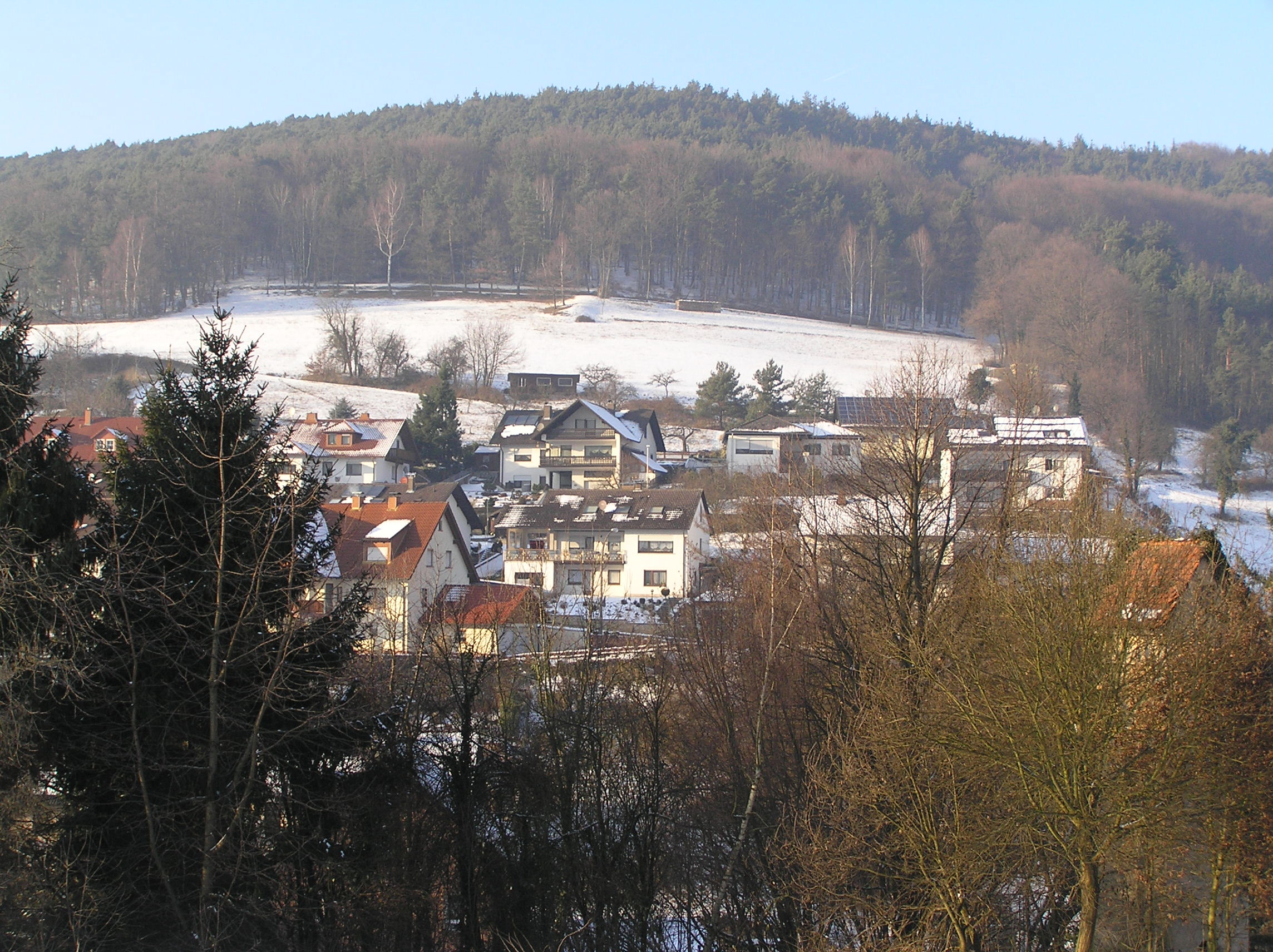 Wohnhäuser im Sulzbacher Ortsteil Soden im Spessart